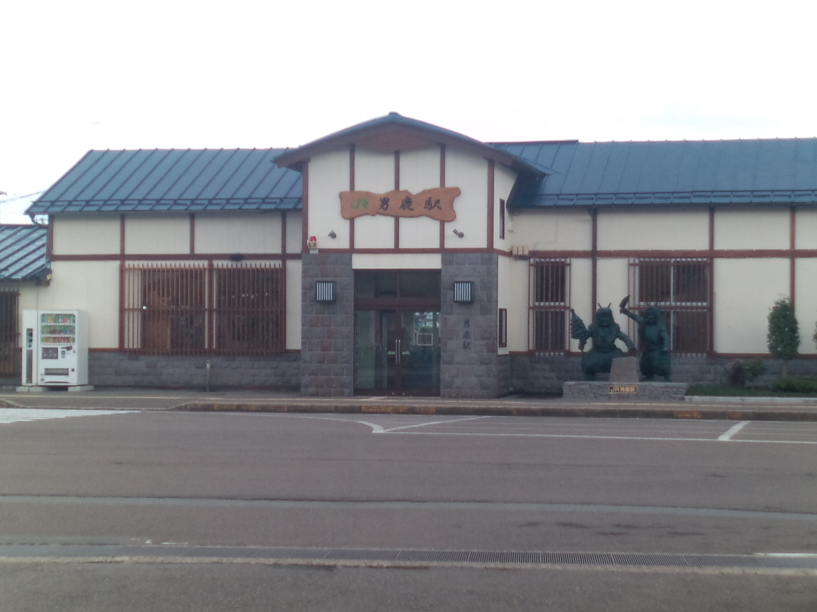 JR東日本・男鹿駅駅舎